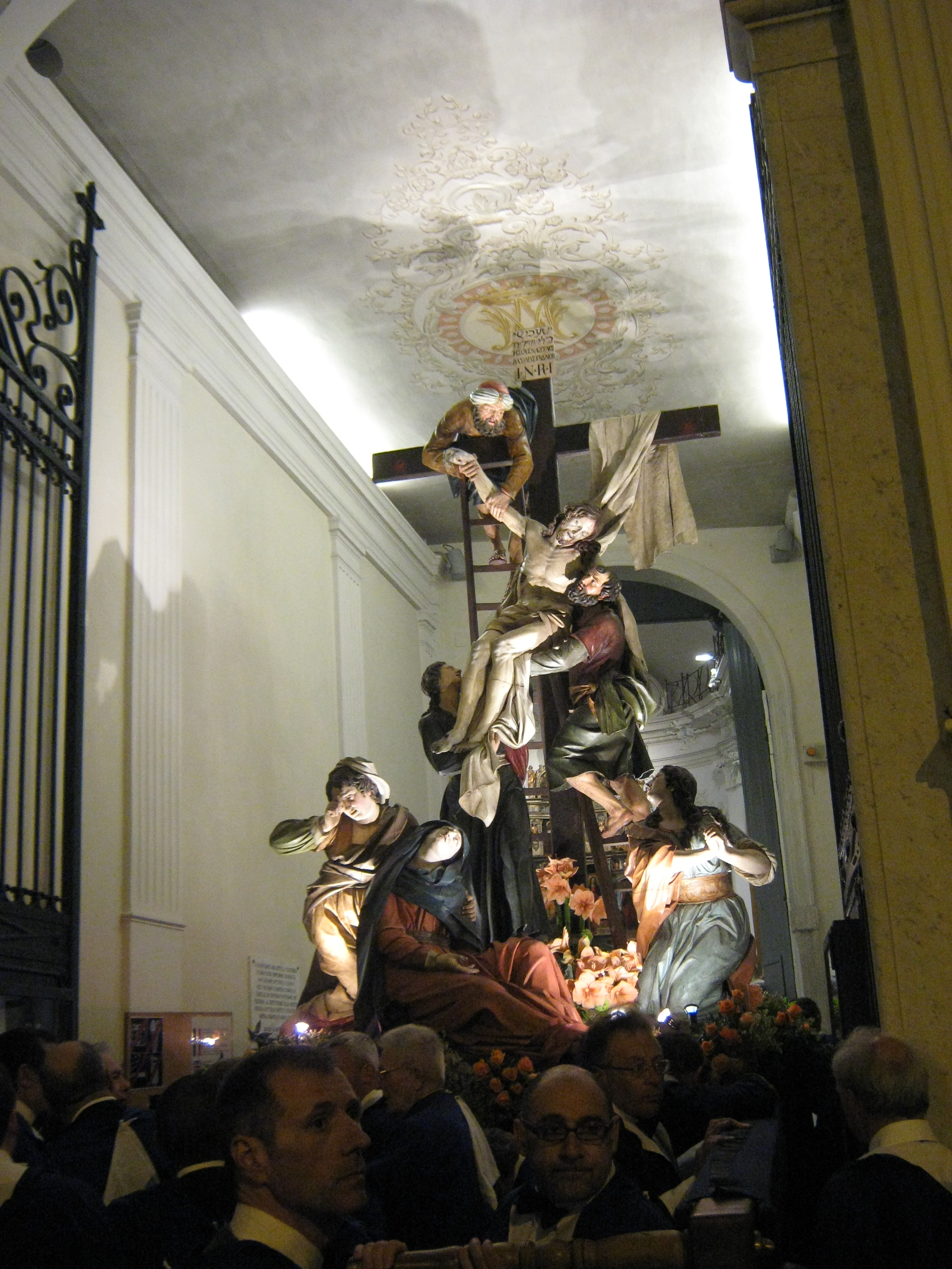 Cassa processionale in legno policromo La deposizione dalla Croce, Filippo Martinengo 1795. Misure: 410x240x285cm. Peso: 16 quintali circa. Confraternita di N.S. di Castello. Processione del Venerdì Santo di Savona 2010.